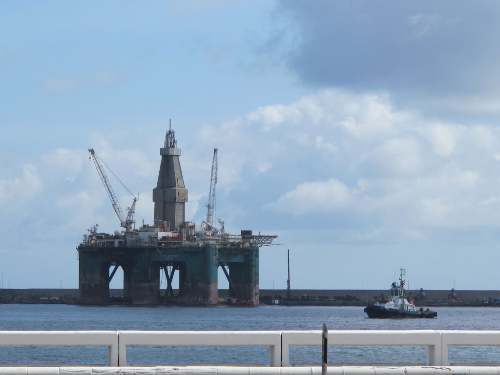 La Plataforma petrolifera "Eirik Raude" en el muelle Reina Sofía del puerto de La Luz y Las Palmas de Gran Canaria. Una de las plataformas petrolíferas flotante más grande del mundo, "Eirik Raude",llegó el pasado lunes al puerto de Las Palmas de Gran Canaria, donde permanecerá unos dos meses para una revisión y puesta a punto general. Esta plataforma pesa más de 37.000 toneladas, mide casi 120 metros de alto por 110 de eslora y 80 de manga y su magnitud obligó a una maniobra de atraque de casi dos días, en el dique Reina Sofía, lugar donde permanecerá hasta su marcha. Su propietaria es la empresa Ocean Rig y está previsto que en su reparación intervengan gran número de empresas del puerto de Las Palmas de Gran Canaria. Eirik Raude se completó en 2002 como una unidad de perforación de quinta generación semi-sumergible construido para el Bingo 9000 de diseño. El casco fue construido en el astillero de Dalian en China, con equipamiento en los EE.UU. por Friede Goldman costa afuera y en Canadá por Irving Astillero de Halifax. Este equipo está diseñado para llevar a cabo las operaciones de perforación en aguas profundas hasta 10 000 pies. Eirik Raude se mantiene estable en condiciones climáticas adversas debido a sus características de movimiento superiores y avanzados sistemas de posicionamiento dinámico. La plataforma está totalmente preparadas para el invierno durante todo el año para operaciones en zonas climáticas extremas, tales como costa afuera de Canadá (Nueva Escocia y Terranova) y en el mar del norte de Noruega (Barents Mar). Eirik Raude se ha actualizado recientemente con un sistema de amarre de 8 puntos. El equipo de perforación perforado 4 pozos en el Mar de Barents bajo extremas condiciones climáticas adversas. Fuente y más información : Fotografías : Ver el video